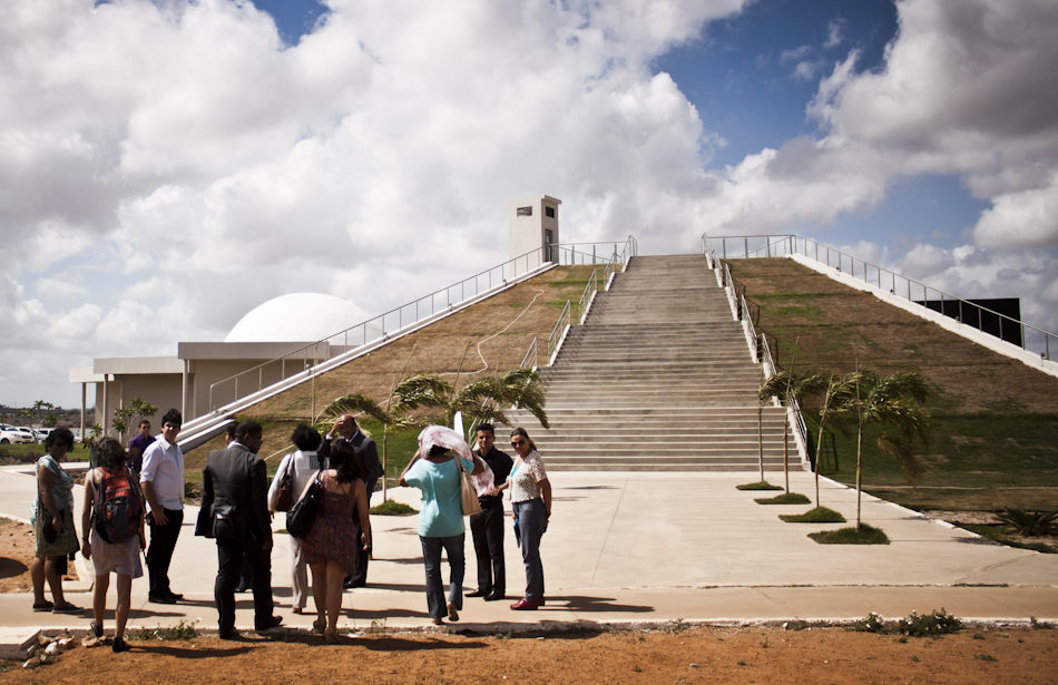 21/02/2013 Lançamento do programa Juventude Viva, em Arapiraca - Alagoas, no Planetário da Cidade (CC BY-SA Participatório / Fora do Eixo)